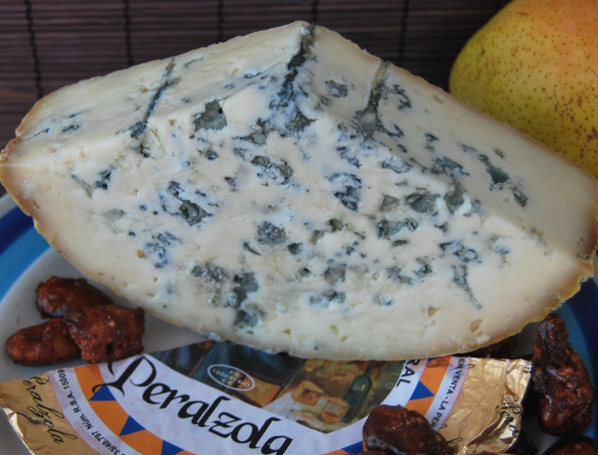 Queso Peralzola